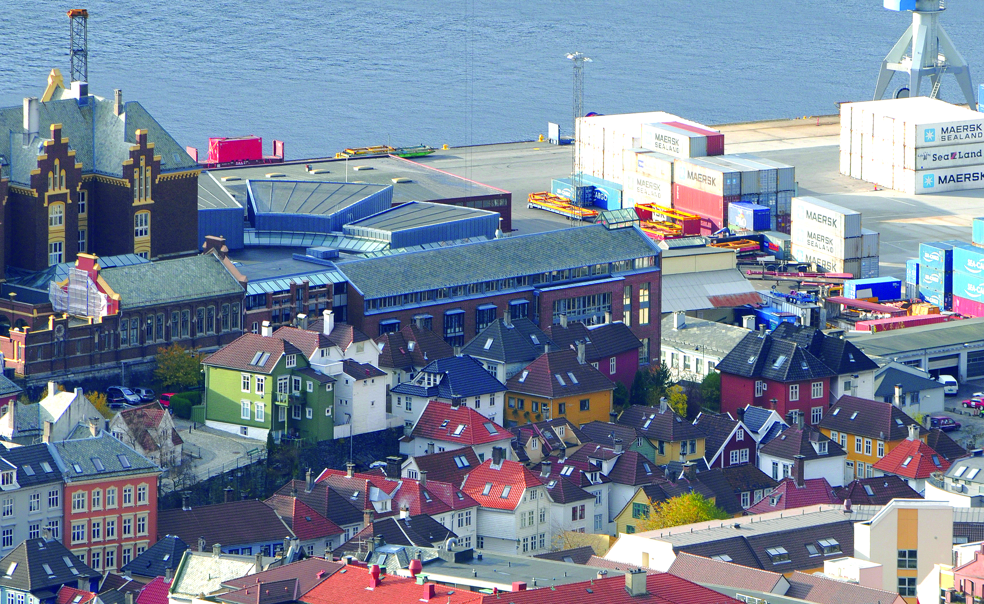 Dragefjellet fotografert fra Fløyen. Dominerende i bildet er Dragefjellet skole, med det nyere tilbygget i rød murstein. Disse byggene er i dag UiBs juridiske fakultet. I forkant av dette ser vi den gamle trehusbebyggelsen i skråningen ned mot Nøstet og Engen.